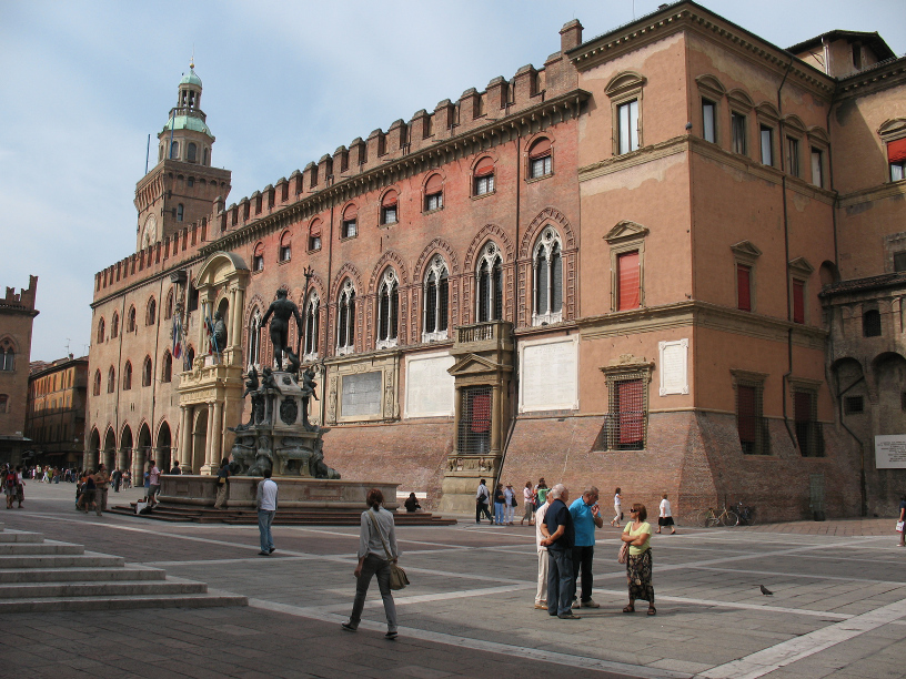 Palazzo del Comune This is a photo of a monument which is part of cultural heritage of Italy.